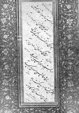 نمونه خط نستعلیق علی‌رضا عباسی چاپ شده در مجله هنر ومردم ، شمار۰ ۱۸۹-۱۹۰ (تير و مرداد ۱۳۵۷)